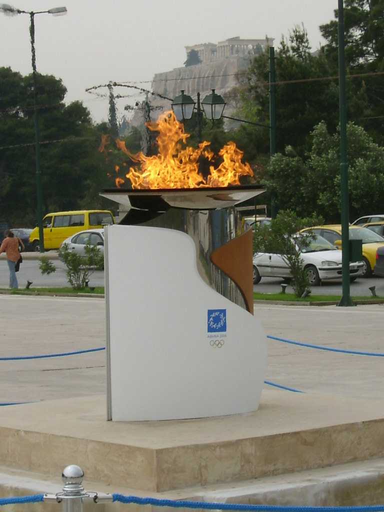 Athènes, flamme olympique. Photo prise par Harrieta171 en avril 2004